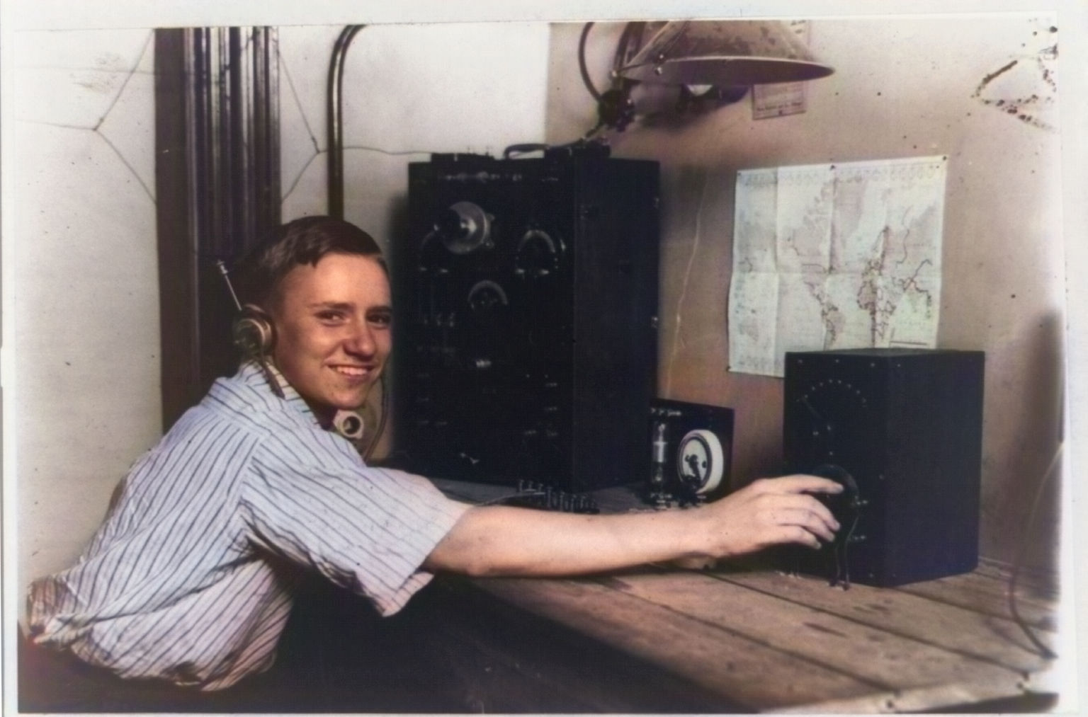 John Iringle, quatorze ans avec l'équipement radio qu'il a construit, Chicago.